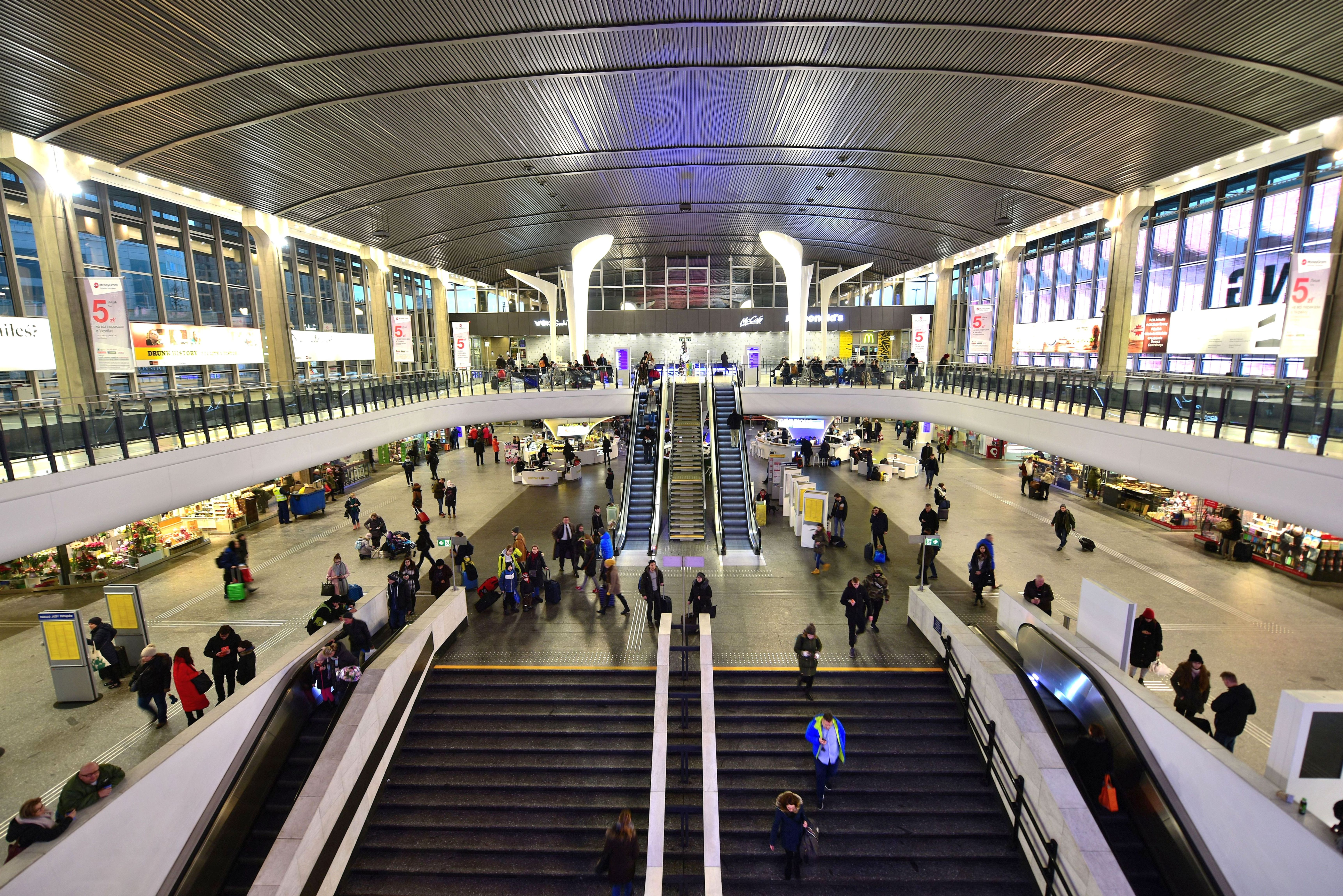 Hala Główna Dworca Centralnego w Warszawie